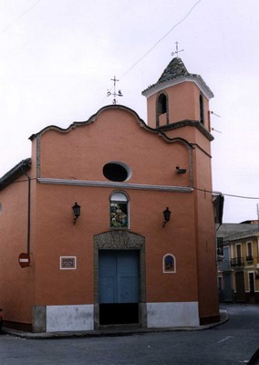 Ermita de Sant Roc i Sant Sebastià, Albalat de la Ribera